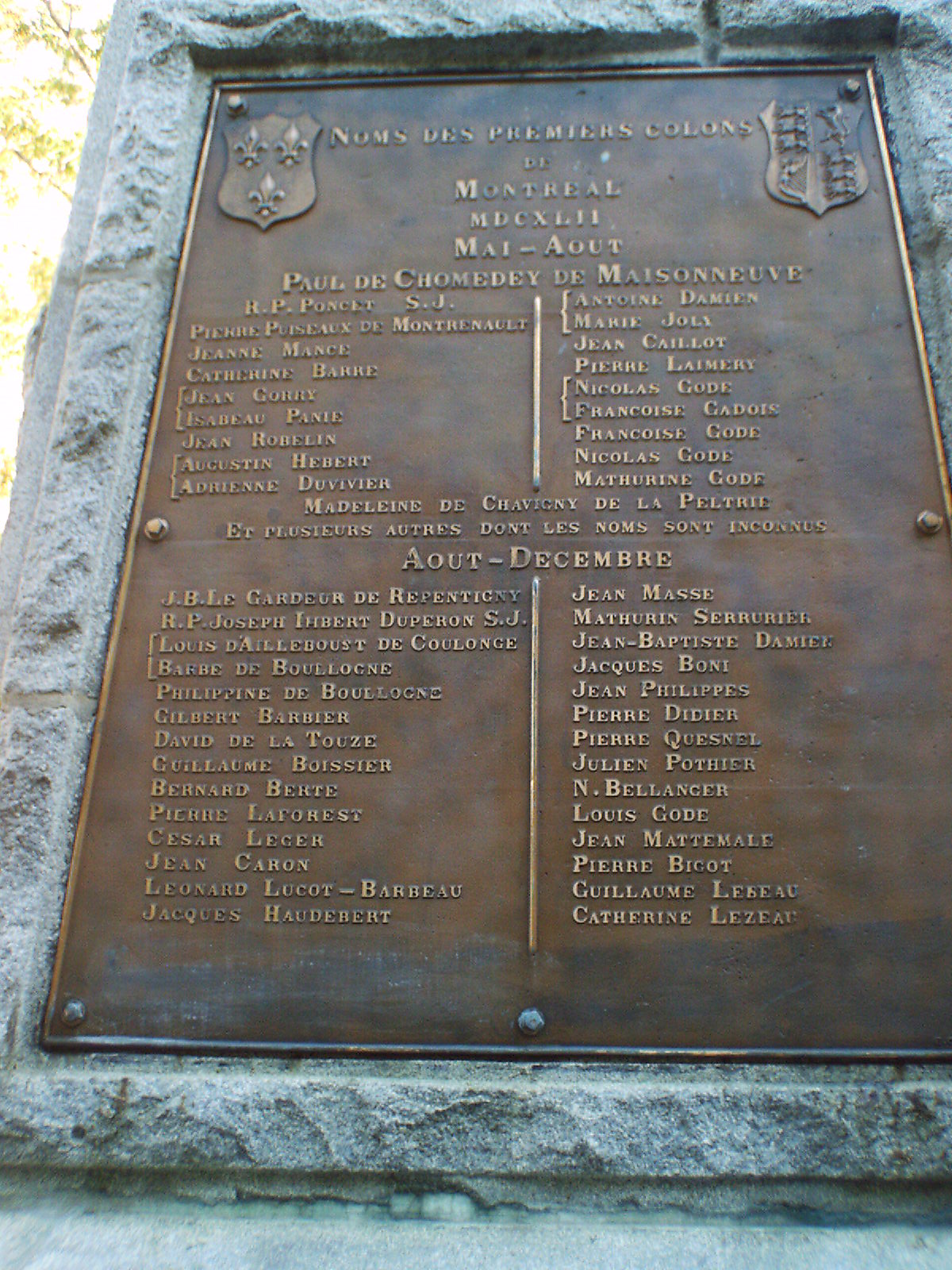 Obélisque Place dYouville